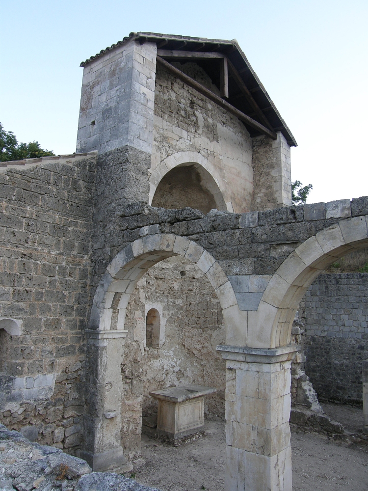 S. Maria di Cartiganano Bussi sul Tirino